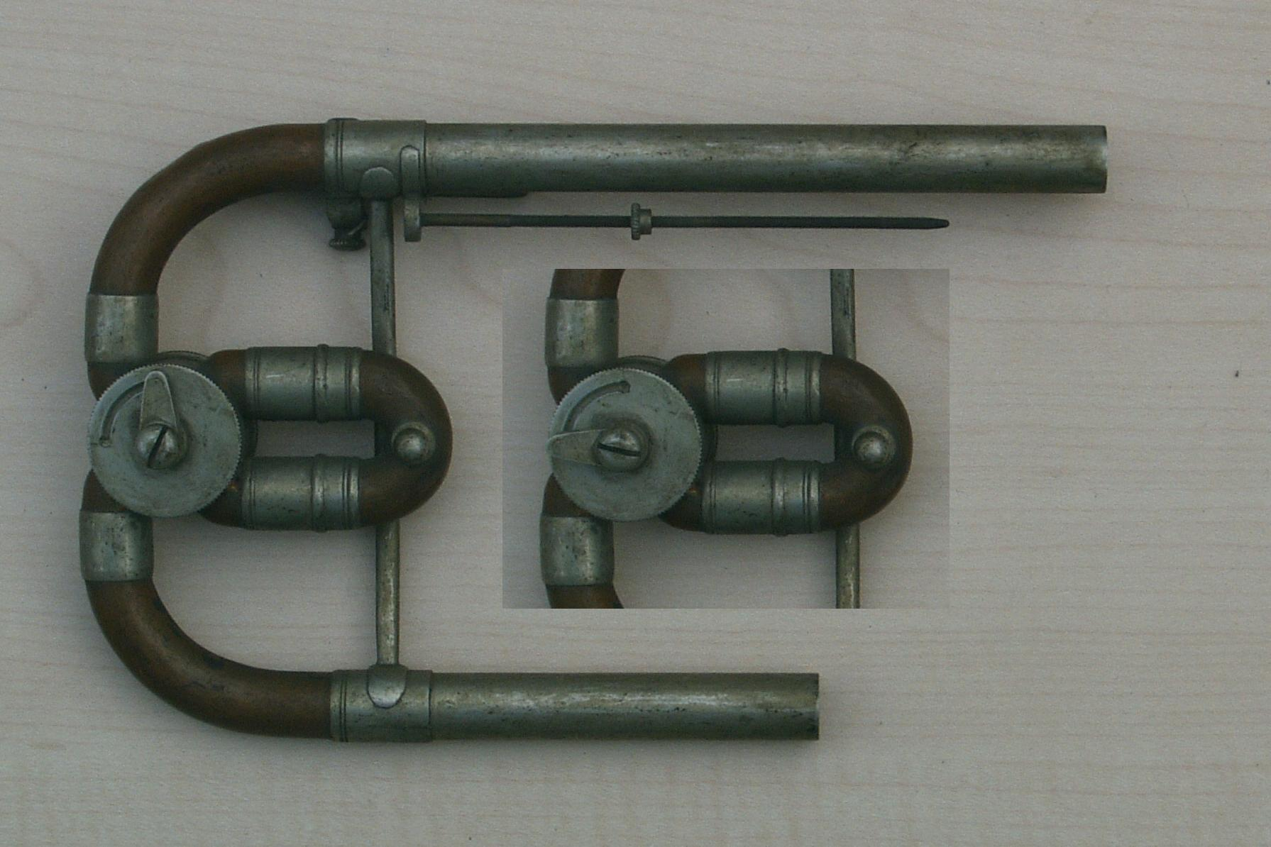 Stellventil eines Trompetenstimmbogens in beiden Stellungen